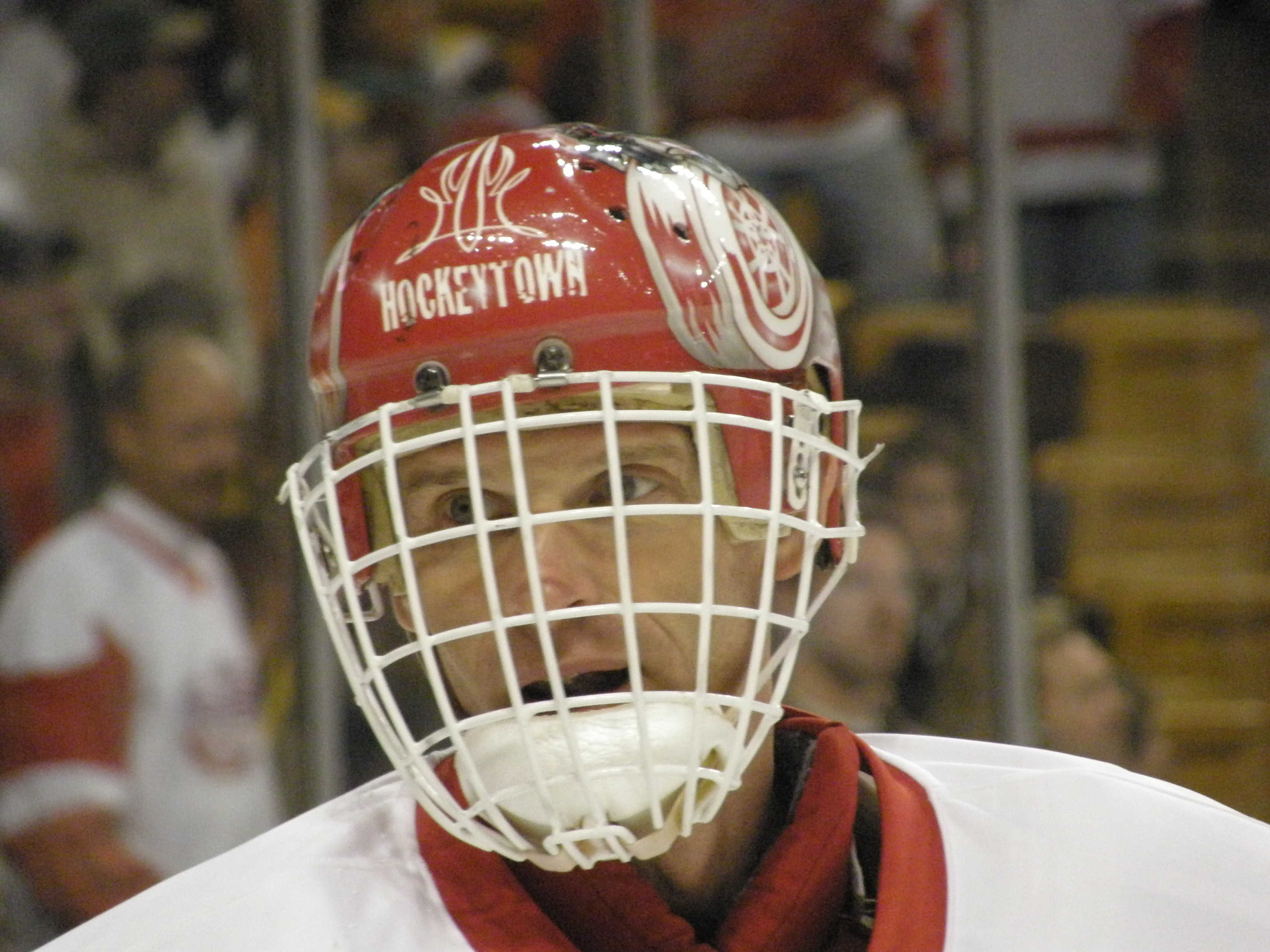 #39 Dominik Hašek (G), Detroit Red Wings